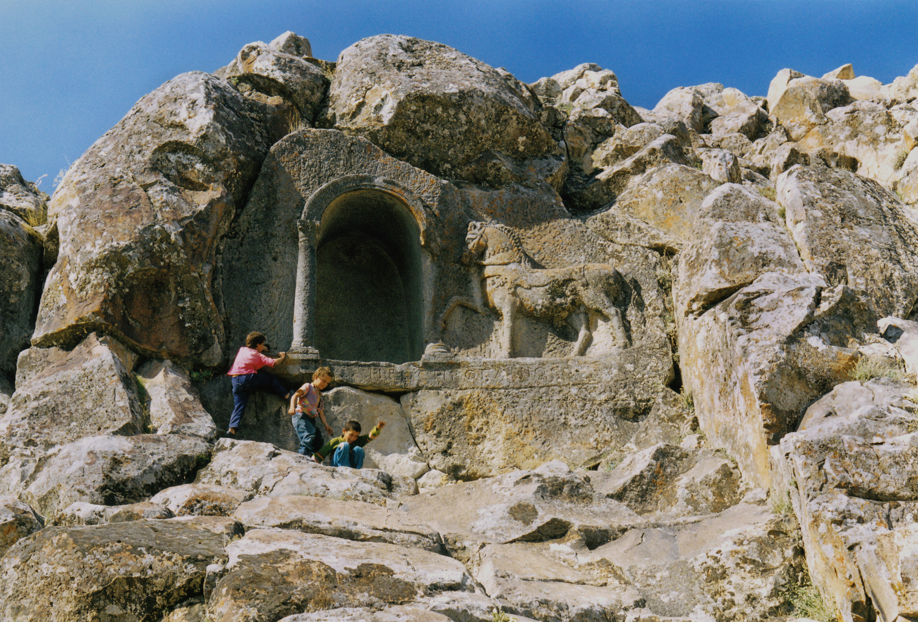 Römisches Grab bei der hethitischen Skulptur von Fasıllar, Türkei